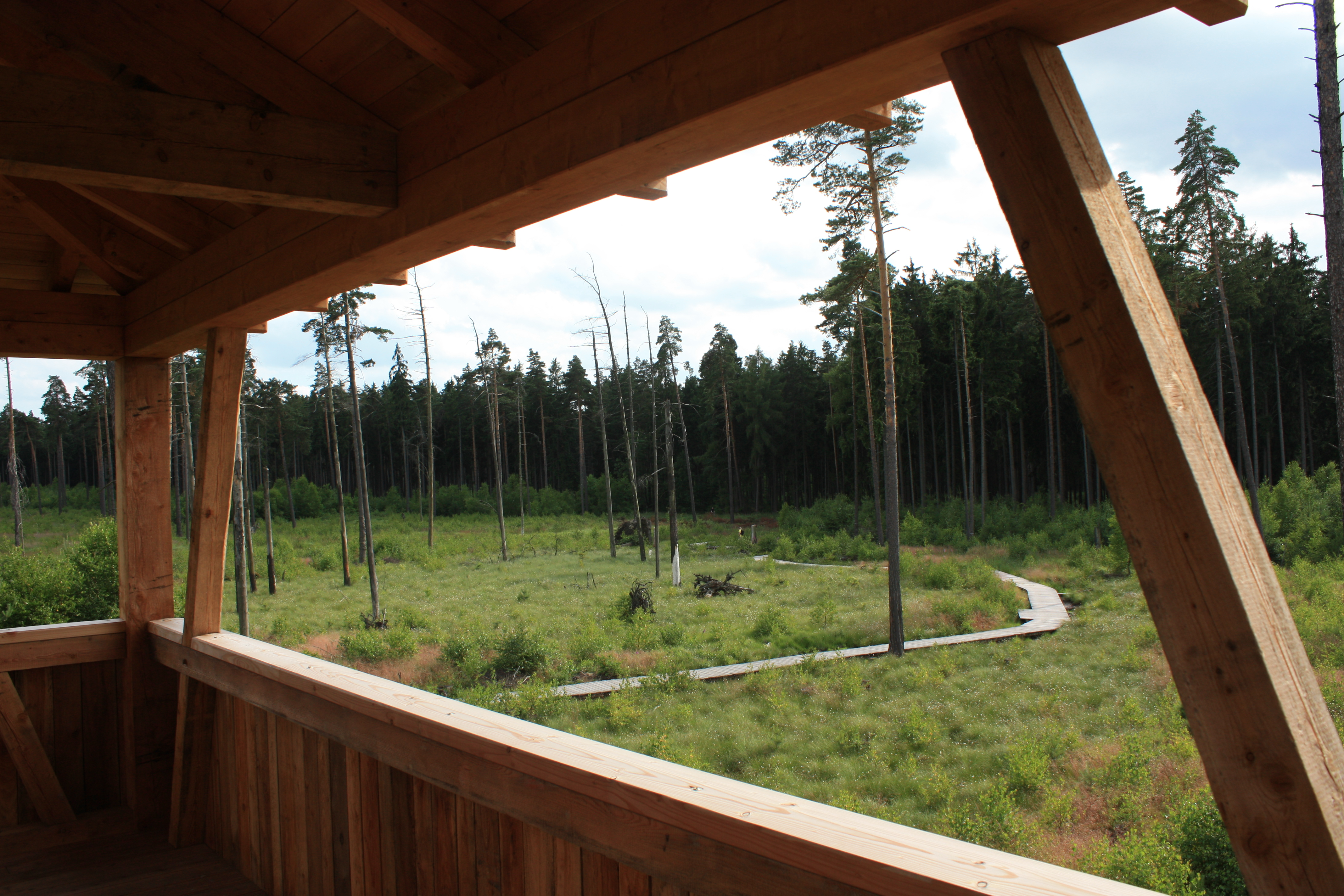 Pöllwitzer Wald, Blick auf den 190 Meter langen Laufsteg